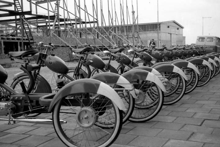 Foto met toestemming van fotograaf Frans Verlinden